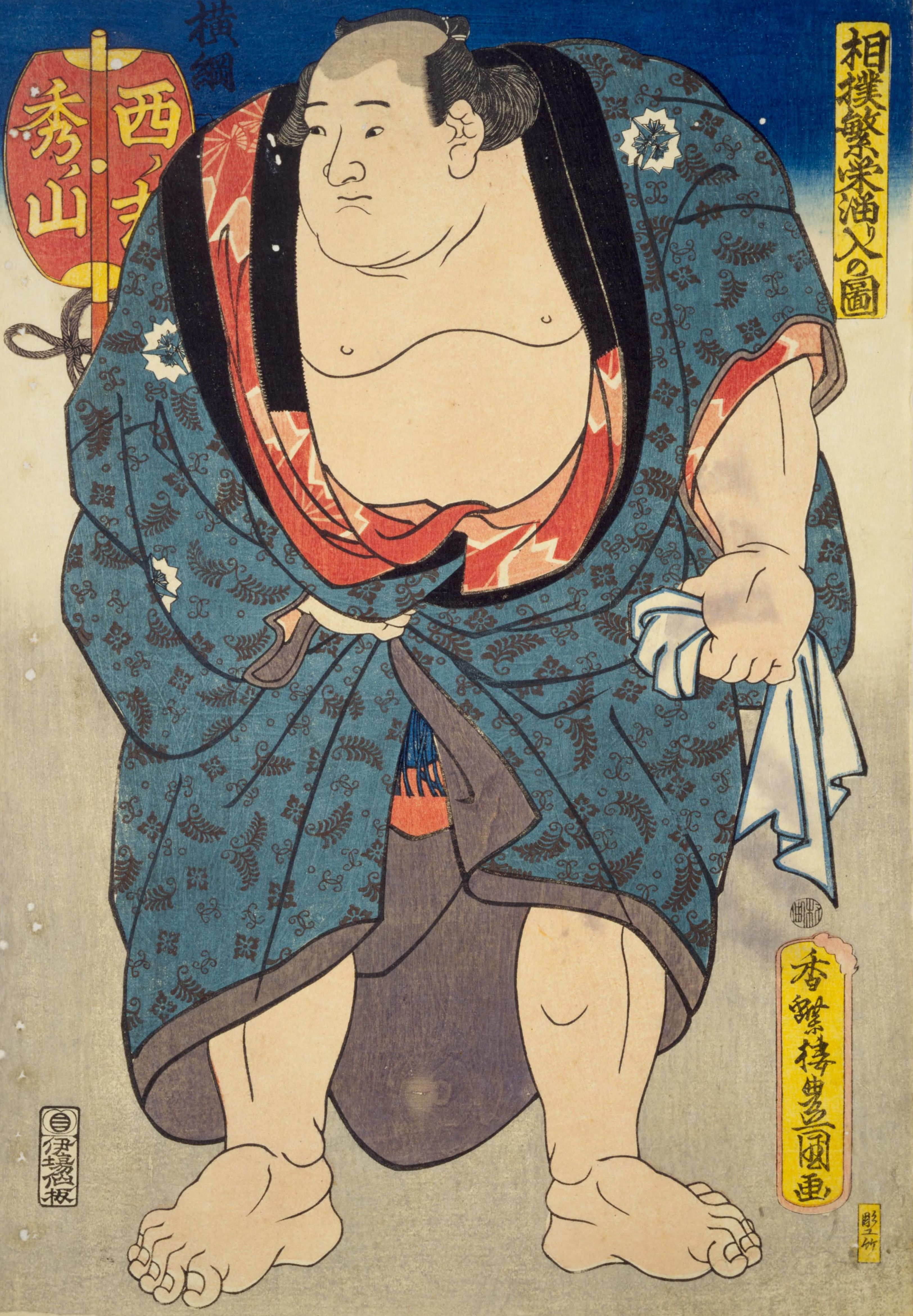 秀ノ山雷五郎